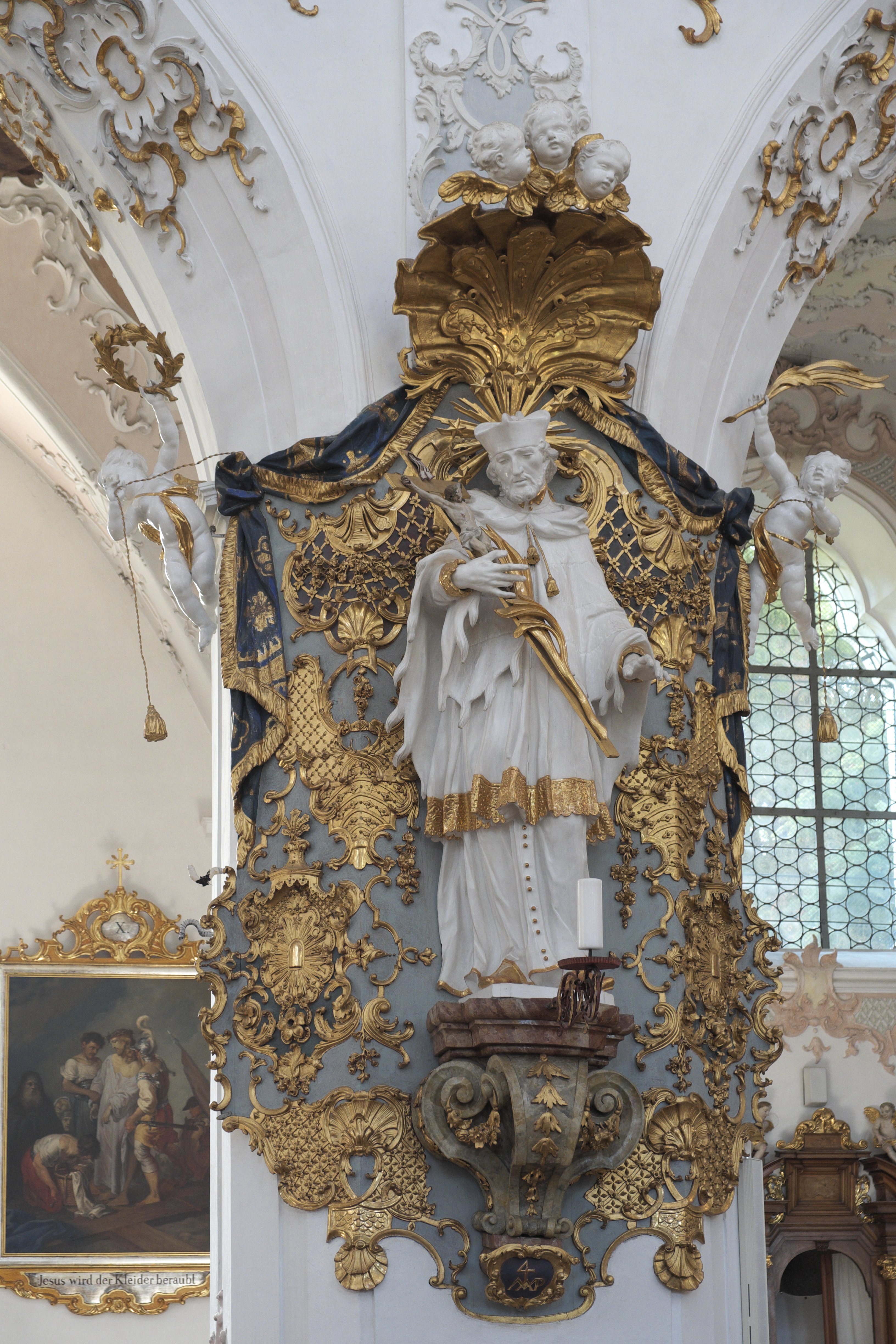 Katholische Pfarrkirche, ehemalige Augustiner-Chorherrenstiftskirche Mariä Geburt in Rottenbuch im Landkreis Weilheim-Schongau (Bayern/Deutschland), Statue des Johannes Nepomuk von Franz Xaver Schmädl